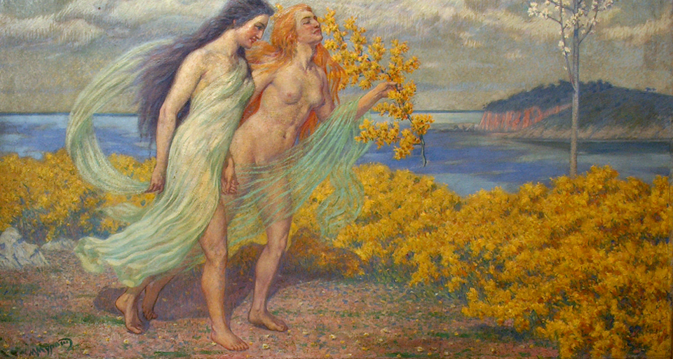 Марко Мурат (1864-1944), „Дах дубровачког пролећа“. Преузето одавде. Слика је у јавном власништву јер је у Хрватској до 27. јула 1999. важио закон по којем су ауторска права важила за живота аутора и 50 година након његове смрти, што значи да је ова слика прешла у јавно власништво 1. јануара 1995. године. У међувремену је донесен нови закон према којем је период заштите ауторских права повећан са 50 на 70 година од ауторове смрти, али се закон не примењује ретроактивно на дела која су у моменту његовог доношења већ била у јавном власништву. Аутор је један део живота провео у Србији. До 2004. године је и у Србији важио закон по којем су имовинска права аутора била заштићена за живота аутора и 50 година после његове смрти, па је и према законима Србије дело прешло у јавно власништво 1. јануара 1995.